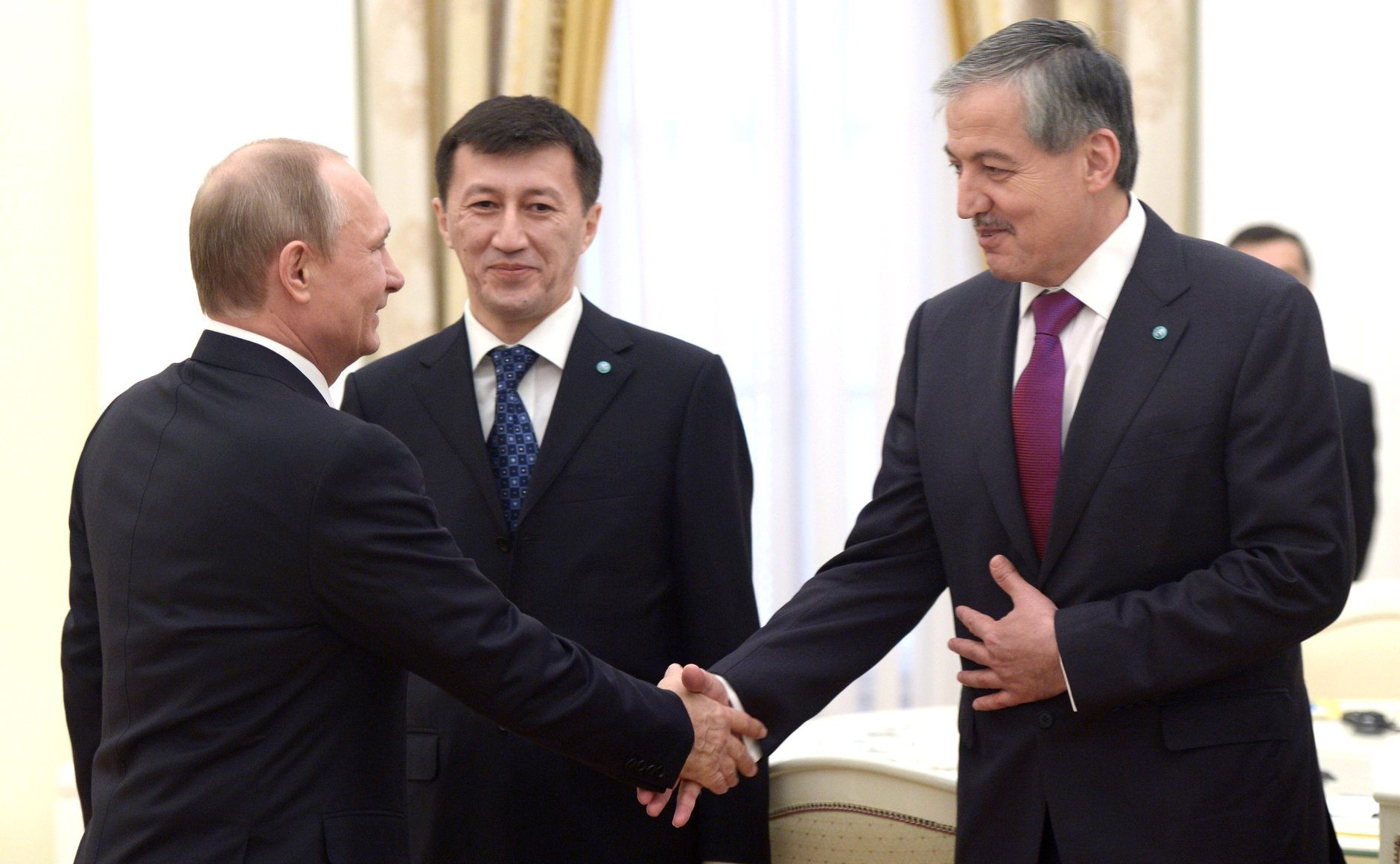 Перед началом встречи с участниками заседания Совета министров иностранных дел ШОС. С Министром иностранных дел Таджикистана Сироджидином Асловым (справа) и заместителем Министра иностранных дел Узбекистана Анваром Насыровым